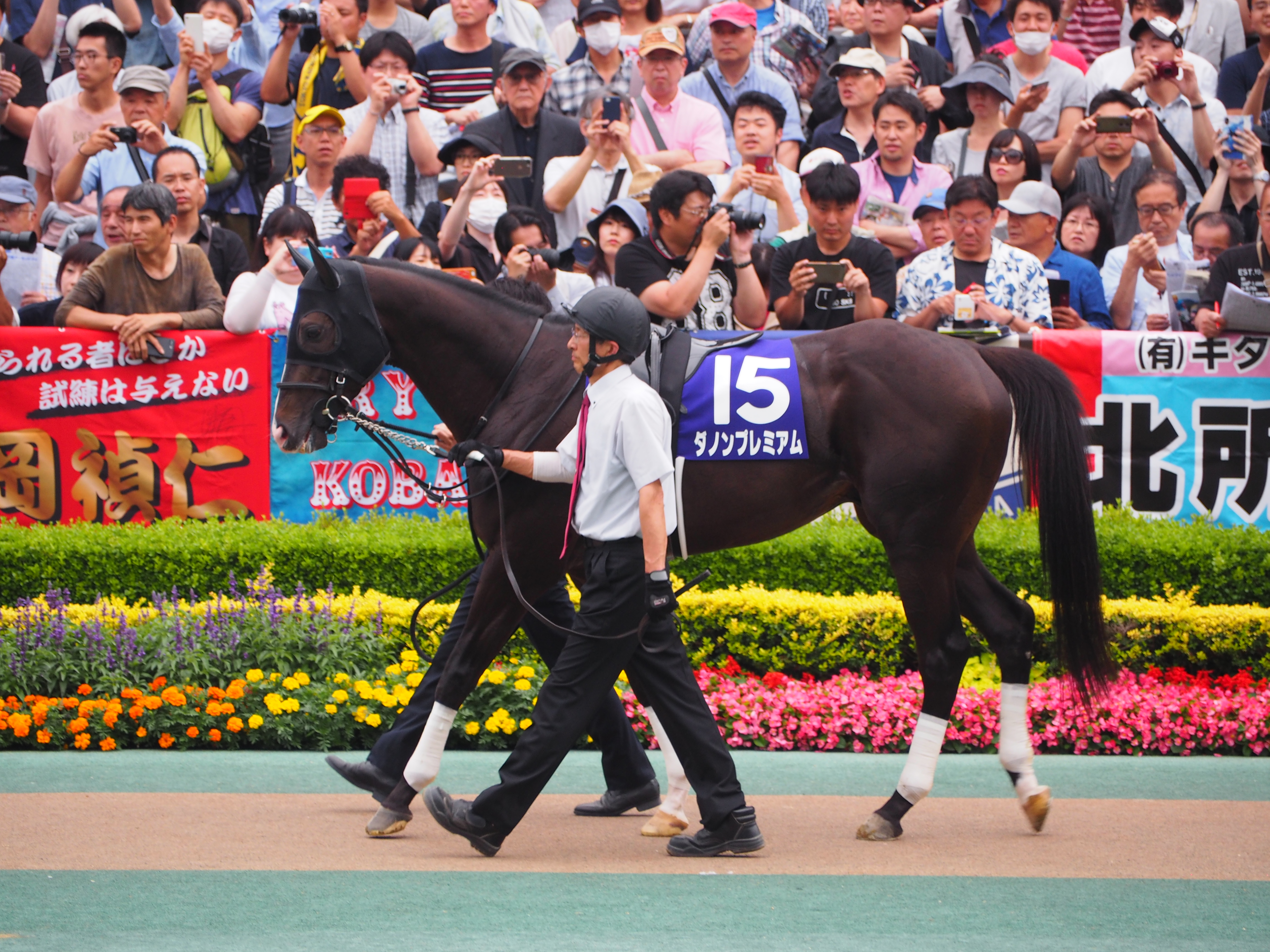 安田記念 パドック 2019